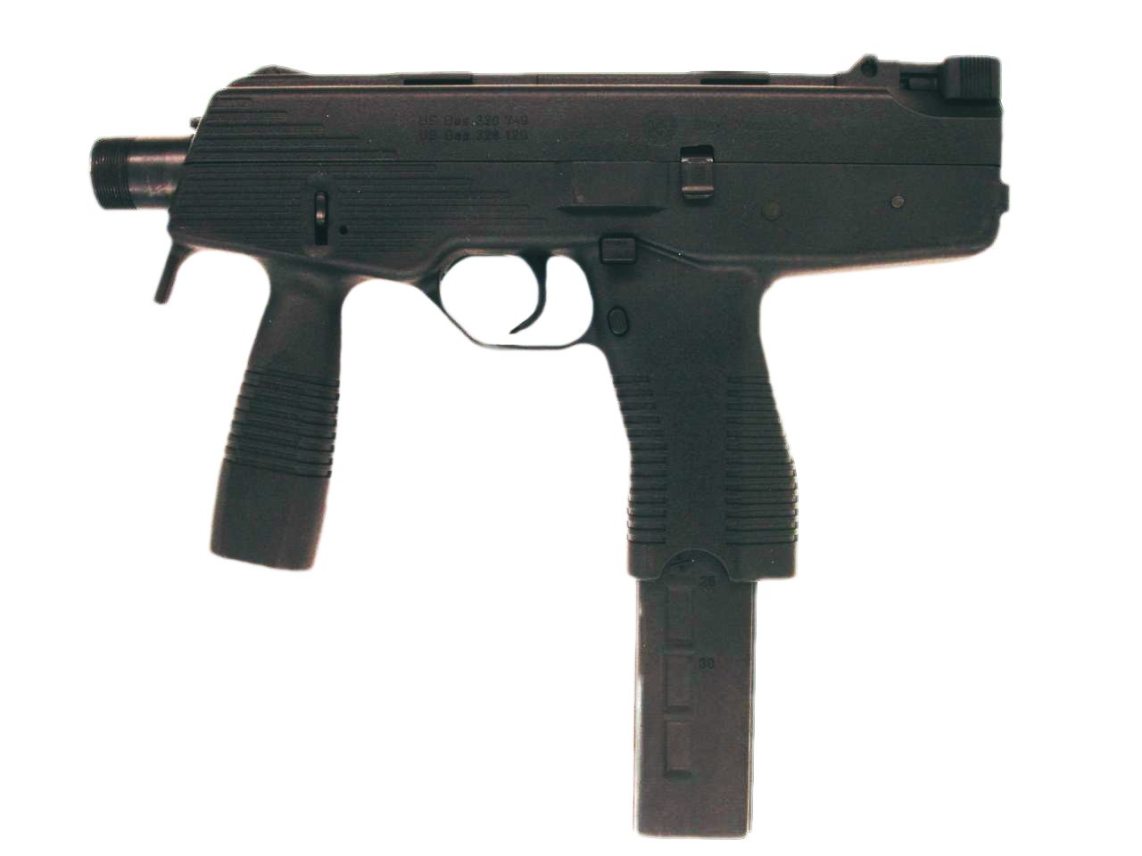 Steyr TMP 9mmPara